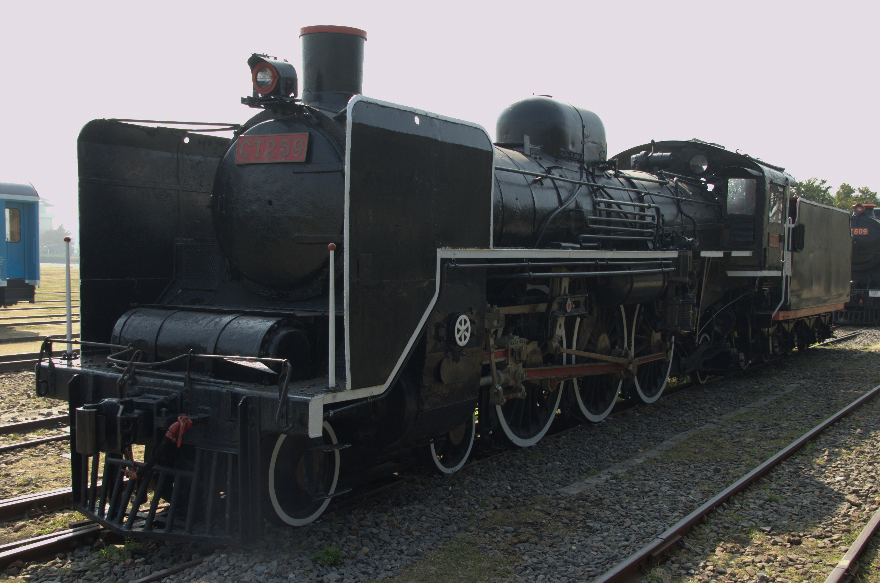 中文（台灣）: 打狗鐵道故事館台鐵CT250型蒸汽機車已回復到正確的CT259號碼牌。